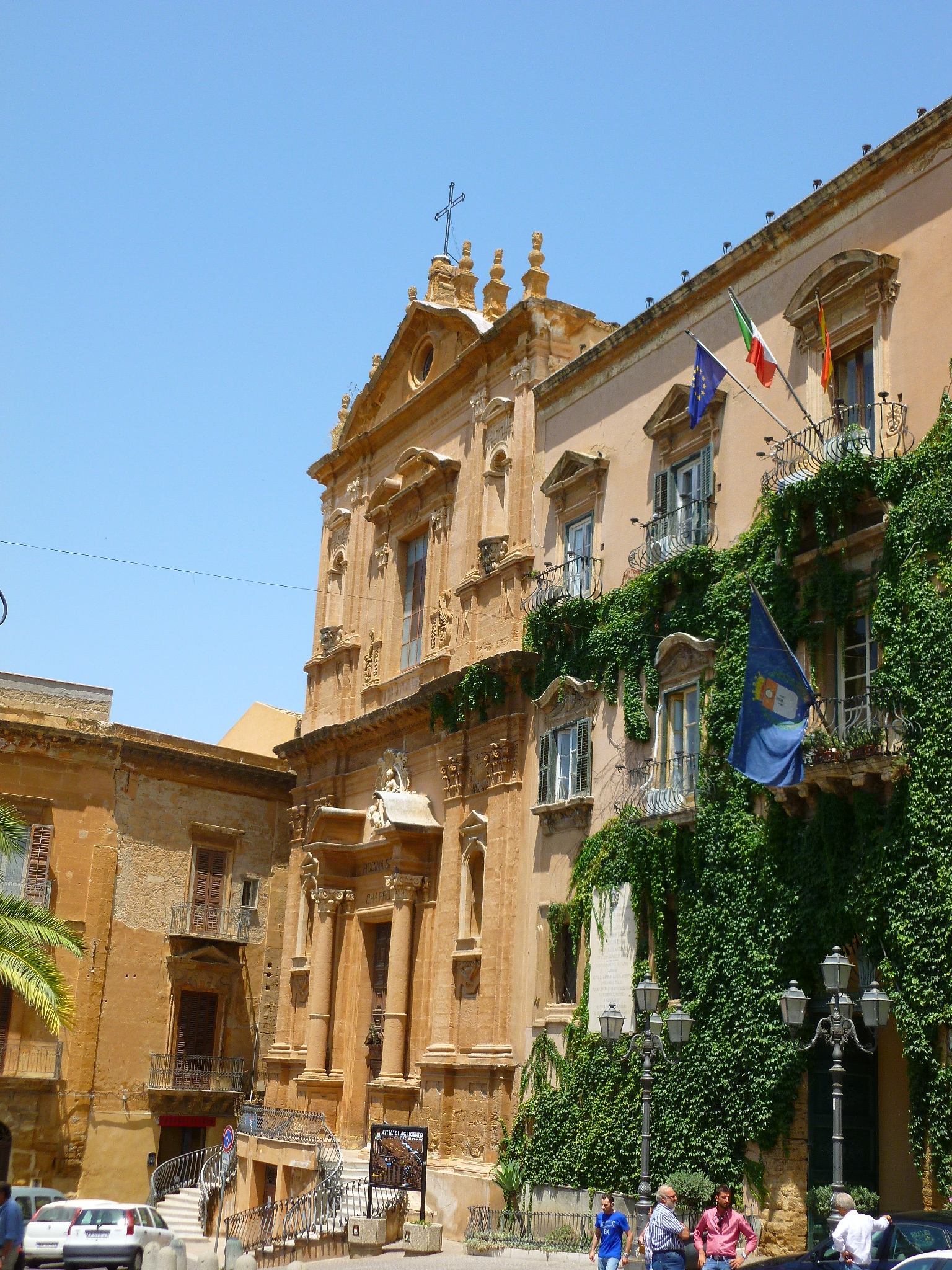 palazzo dei giganti (municipio) e chiesa di San Domenico (a sinistra), Agrigento